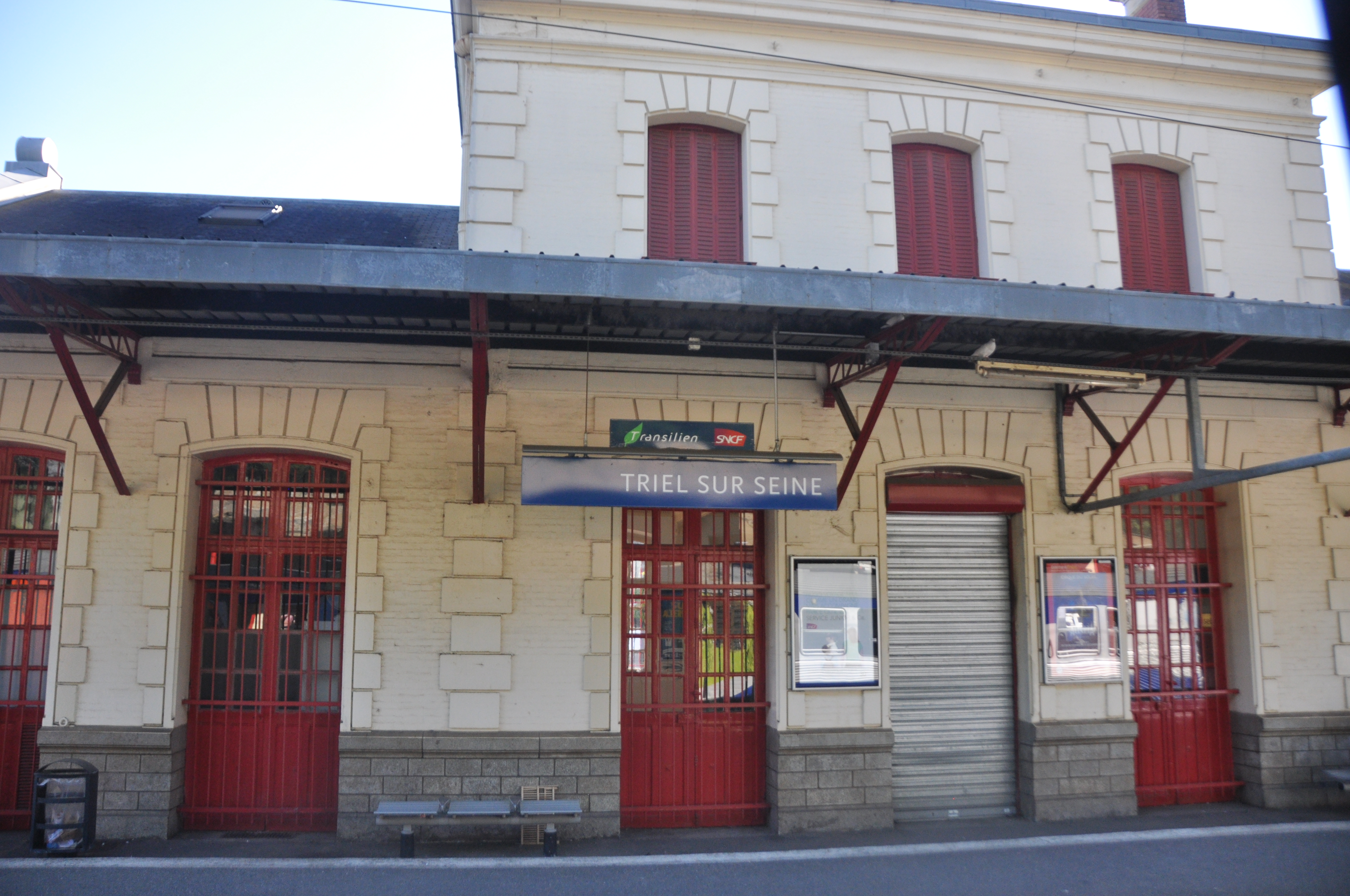 Vue de la façade du bâtiment voyageur de la gare de Triel-sur-Seine, depuis la ligne de Paris-Saint-Lazare à Mantes-Station par Conflans-Sainte-Honorine, vers Paris.